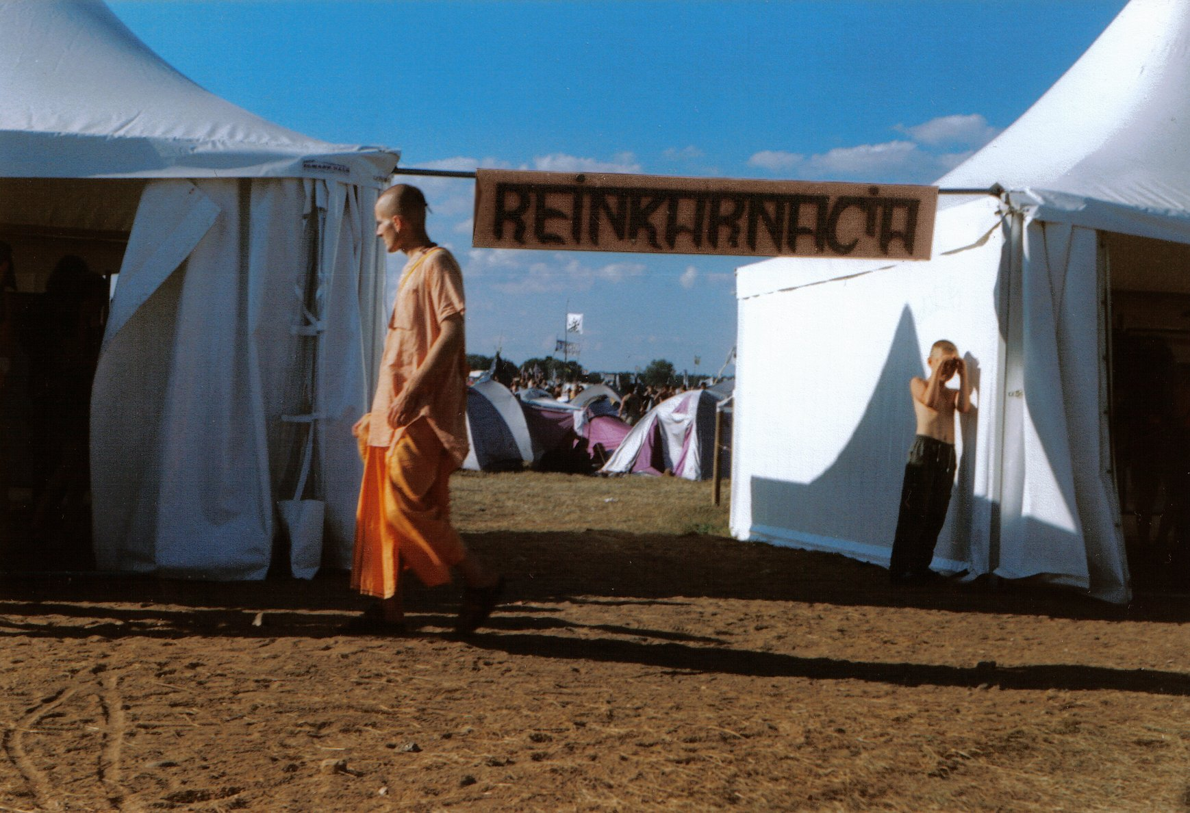 "Wioska" Hare Kryszna na Przystanku Woodstock. 2002 r. Autor Mohylek 20:59, 30 gru 2005 (CET)